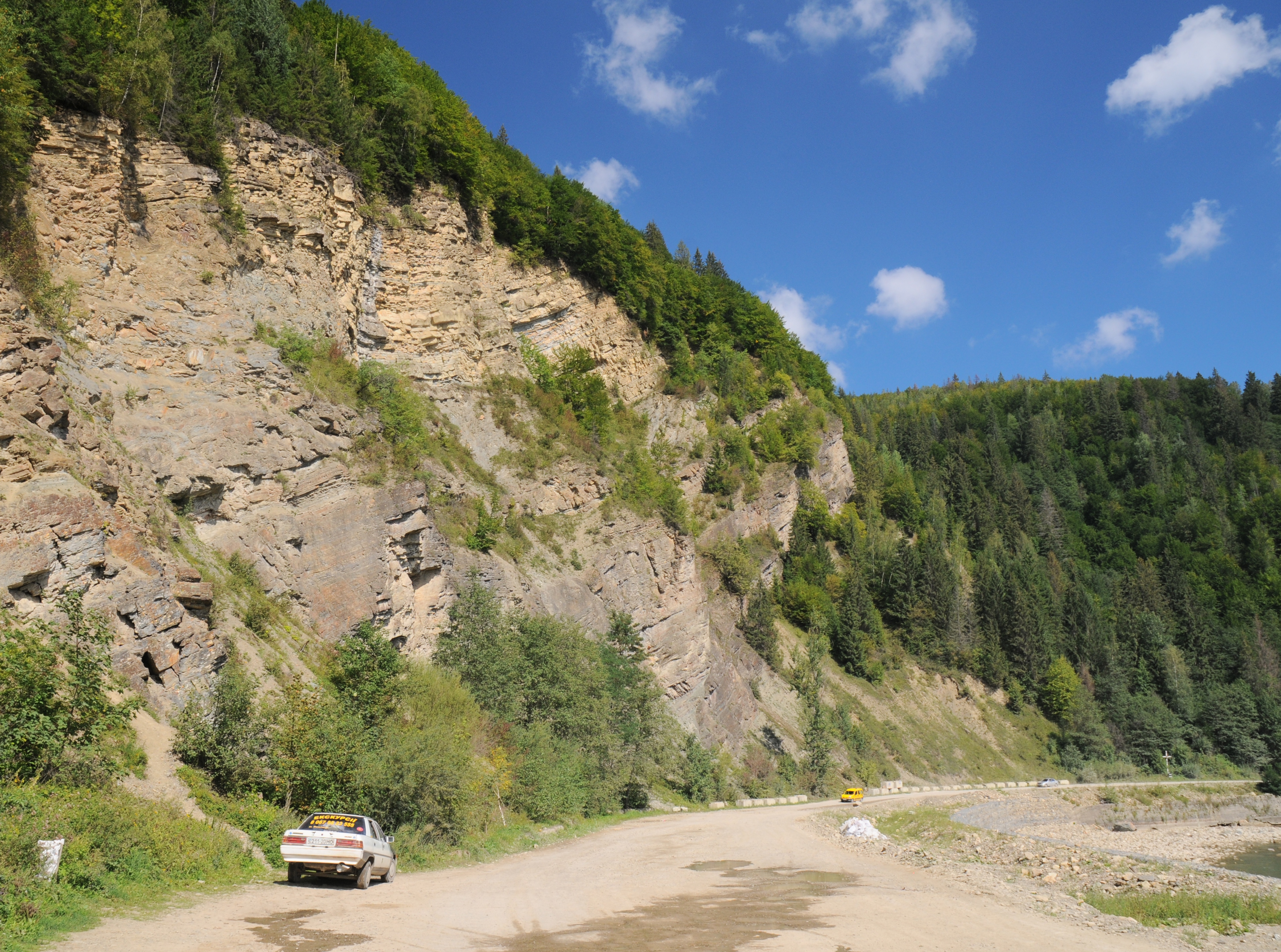 Національний природний парк "Гуцульщина"